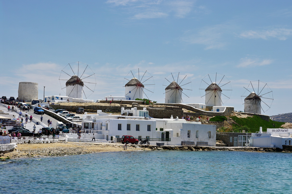 Windmühlenhügel Kato Mili Mykonos